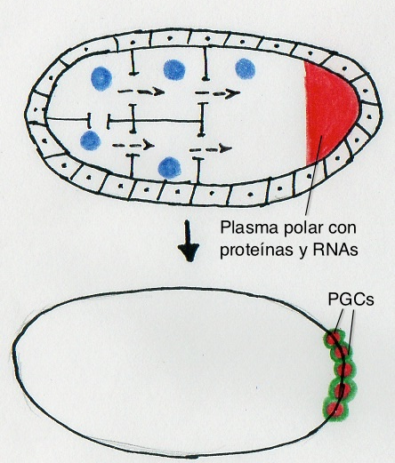 Diferenciación de PGCs en D. melanofaster mediada por el plasma polar